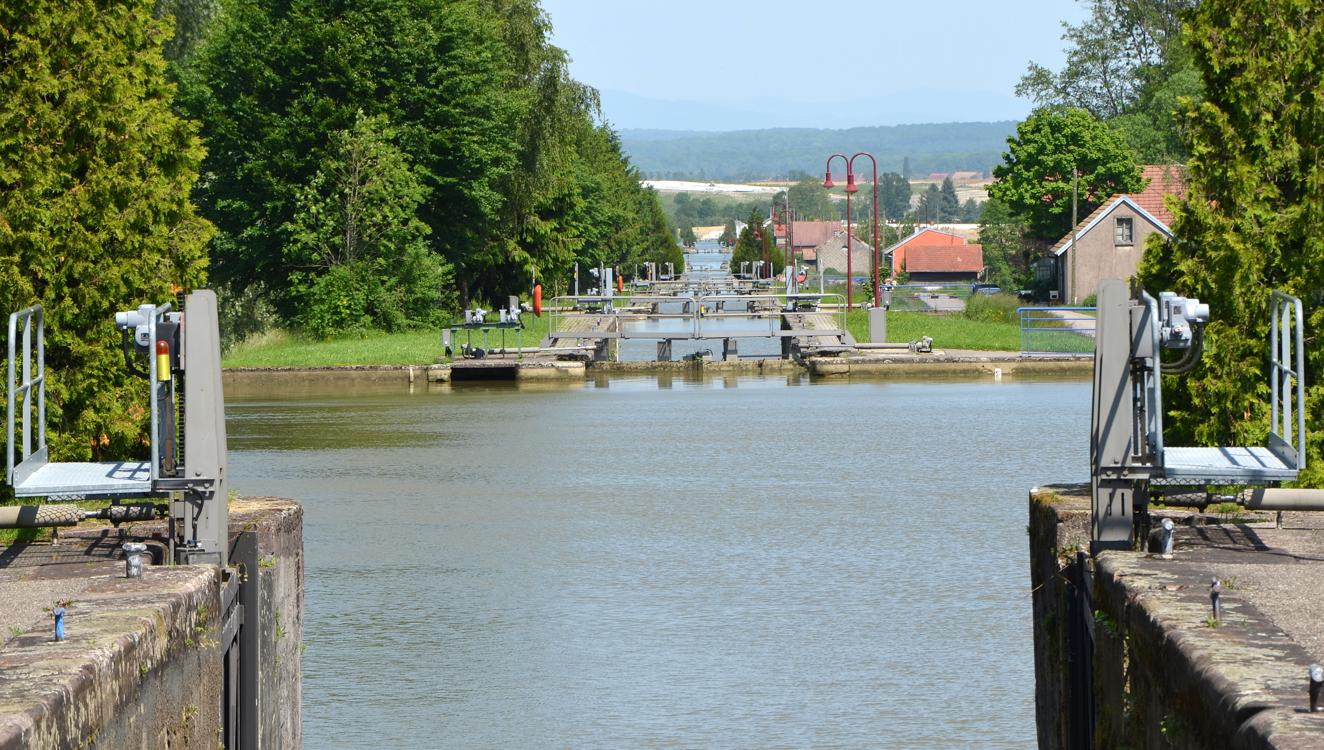 Echelle d ecluses du canal du Rhone au Rhin vers Valdieu, Haut-Rhin, Alsace, France